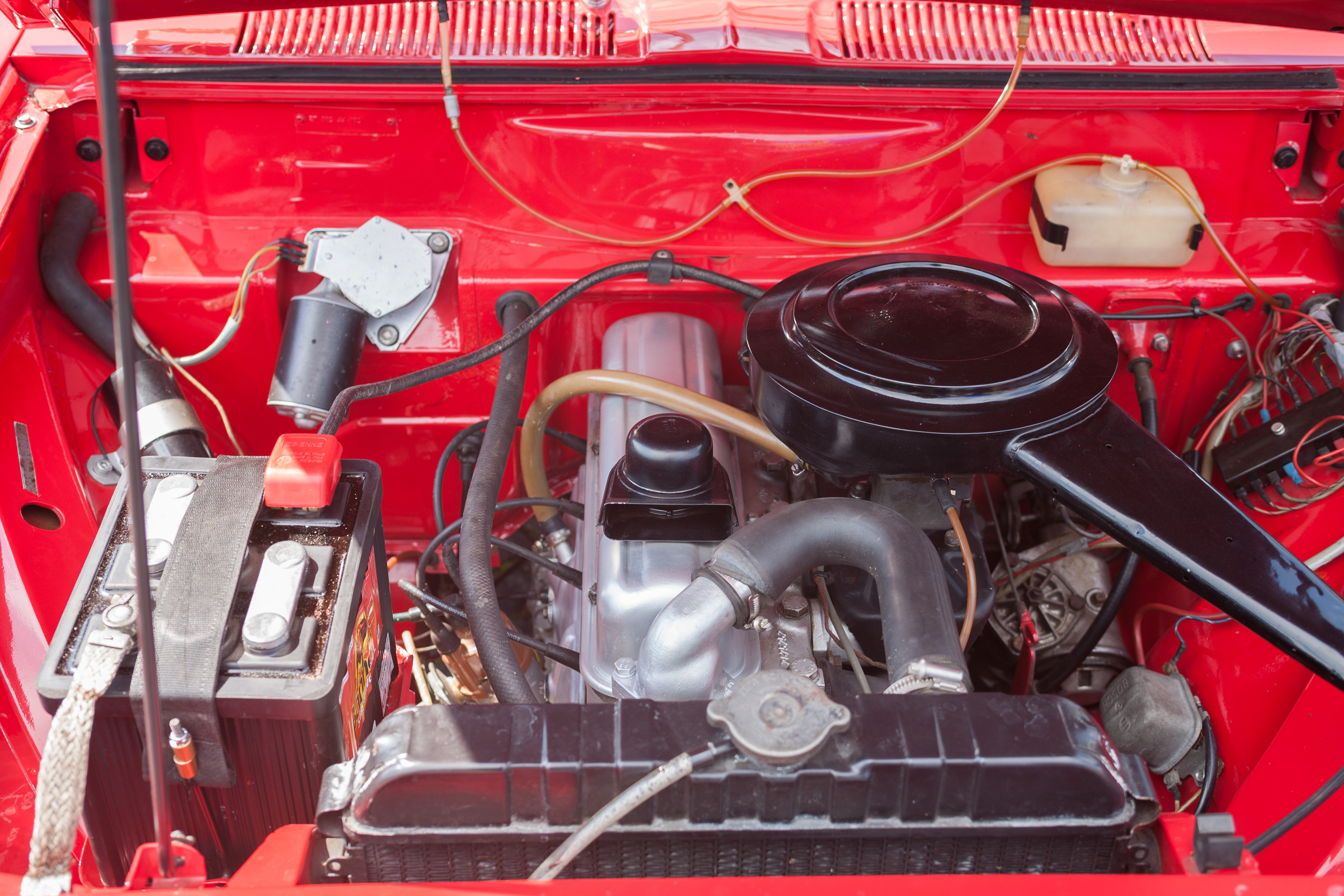 Rheinbach Classics 2007 – Motorraum eines Opel Rekord A